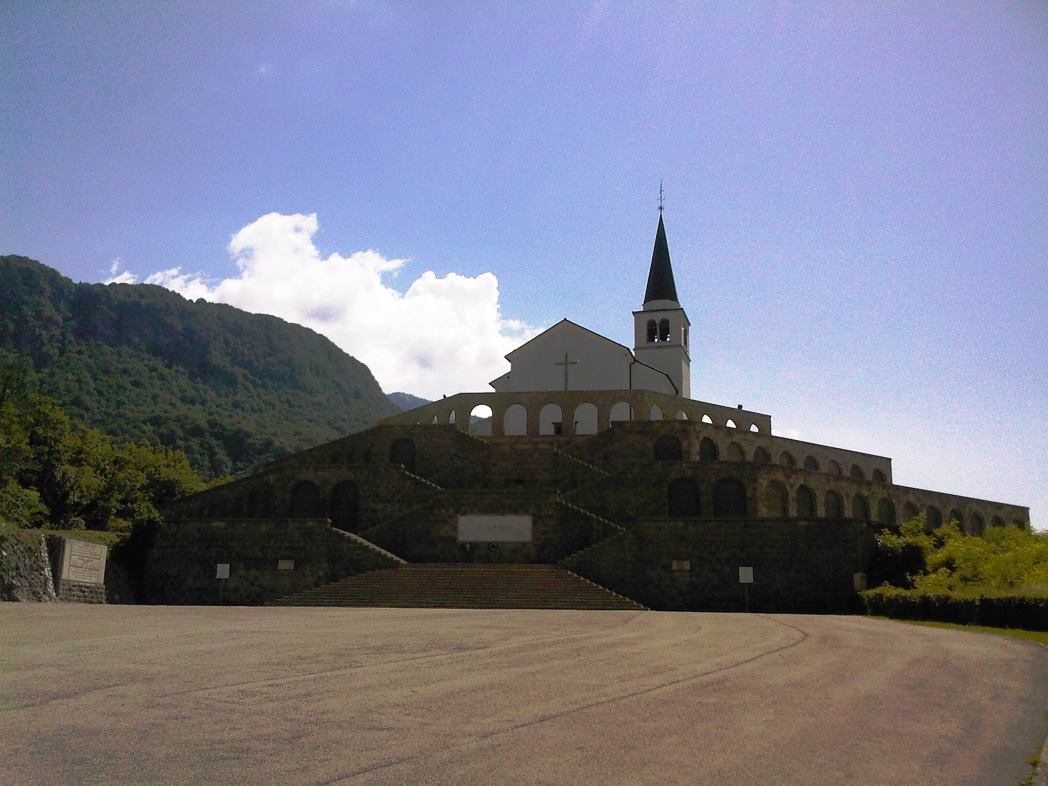 Sacrario di Sant'Antonio - Caporetto